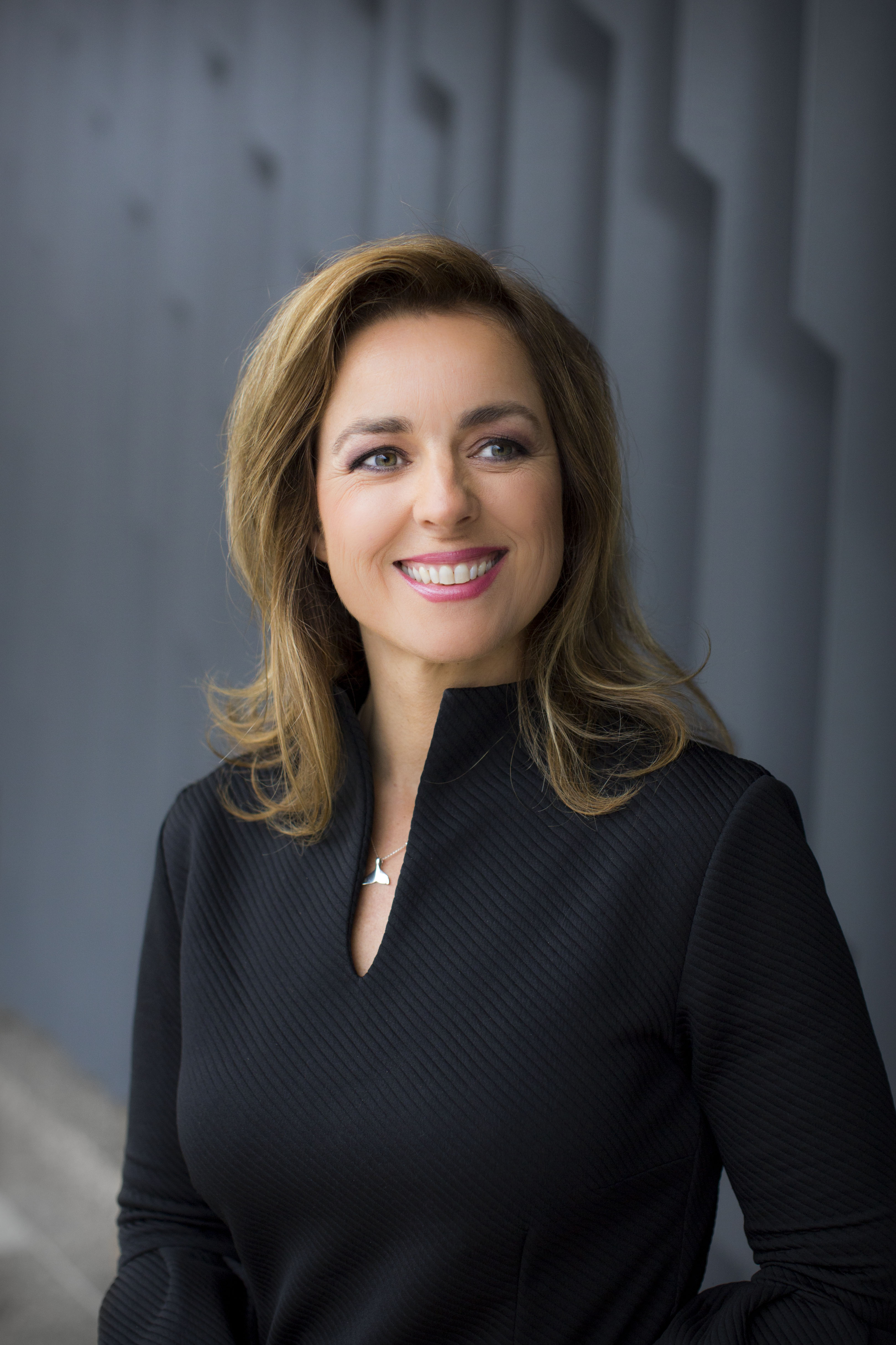 Portret van Marianne Thieme, voormalig fractievoorzitter en partijleider van de Partij voor de Dieren, in de Tweede Kamer